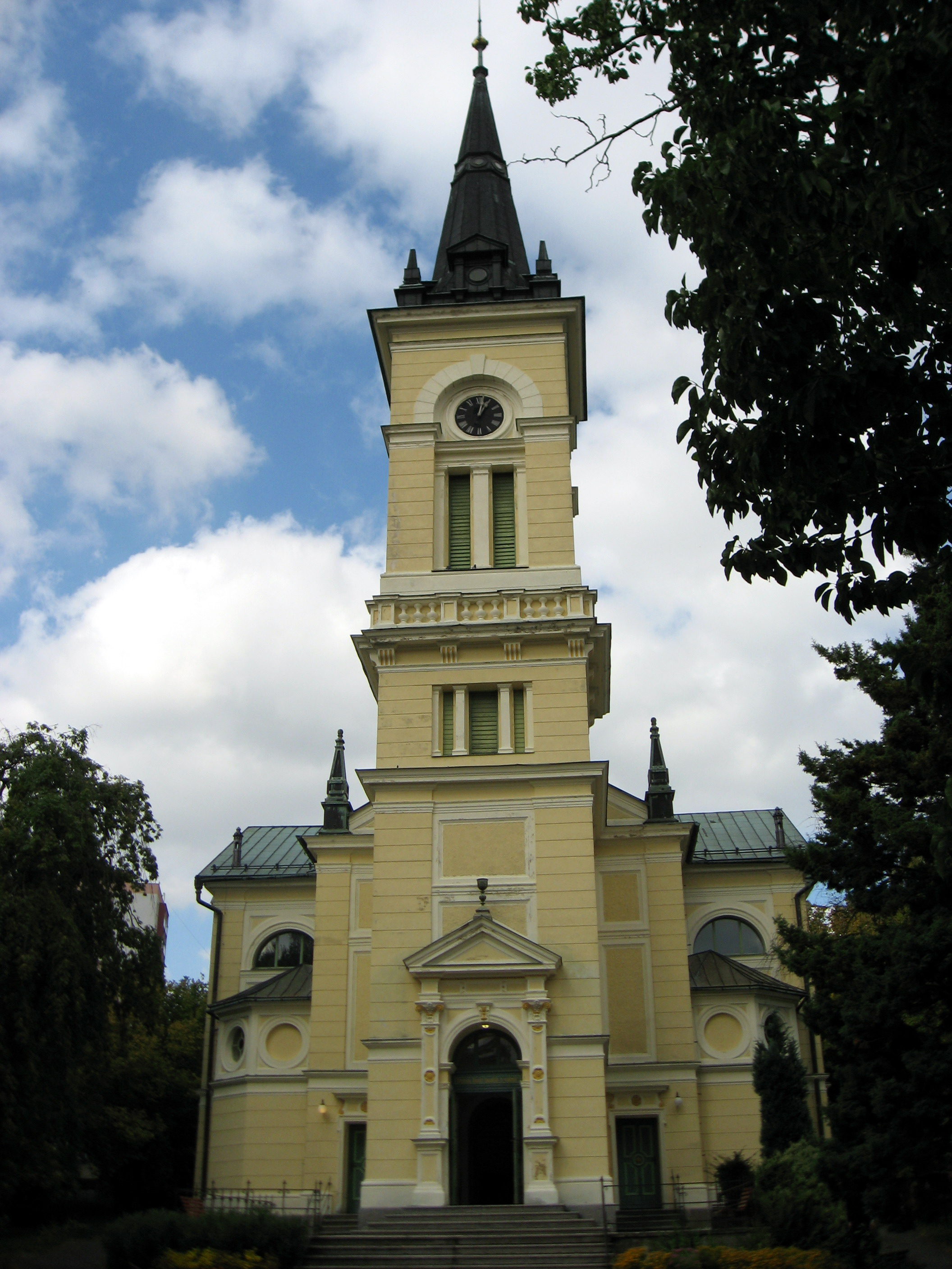 Nové Město na Moravě, evangelický kostel